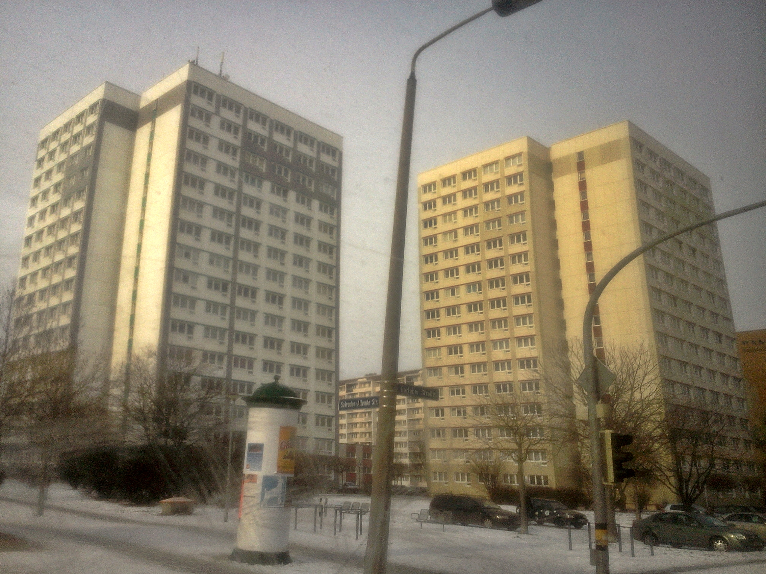 Wohnhochhäuser nahe dem Neustädter Platz in Magdeburg